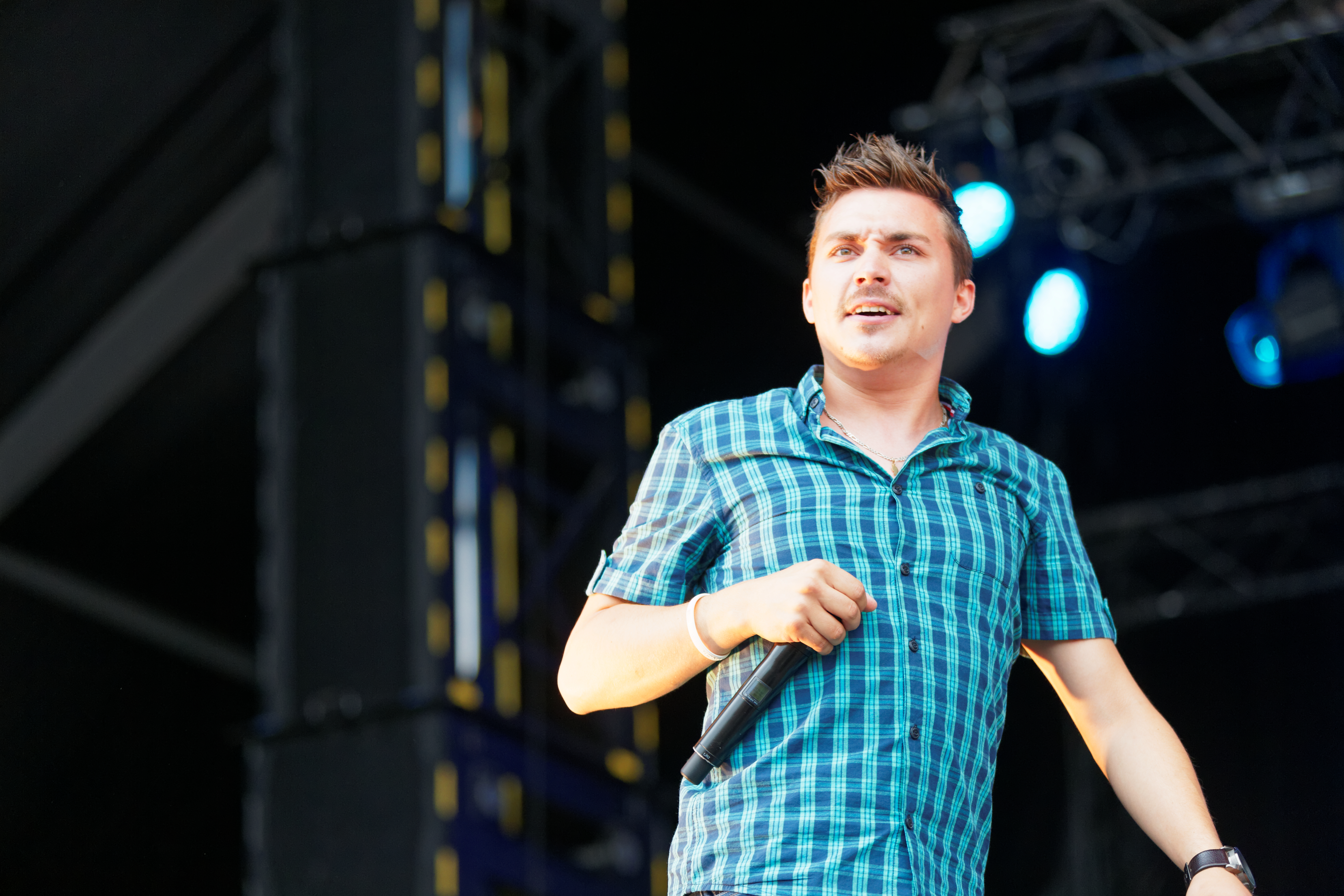 Le festival des vieilles charrues 2015.